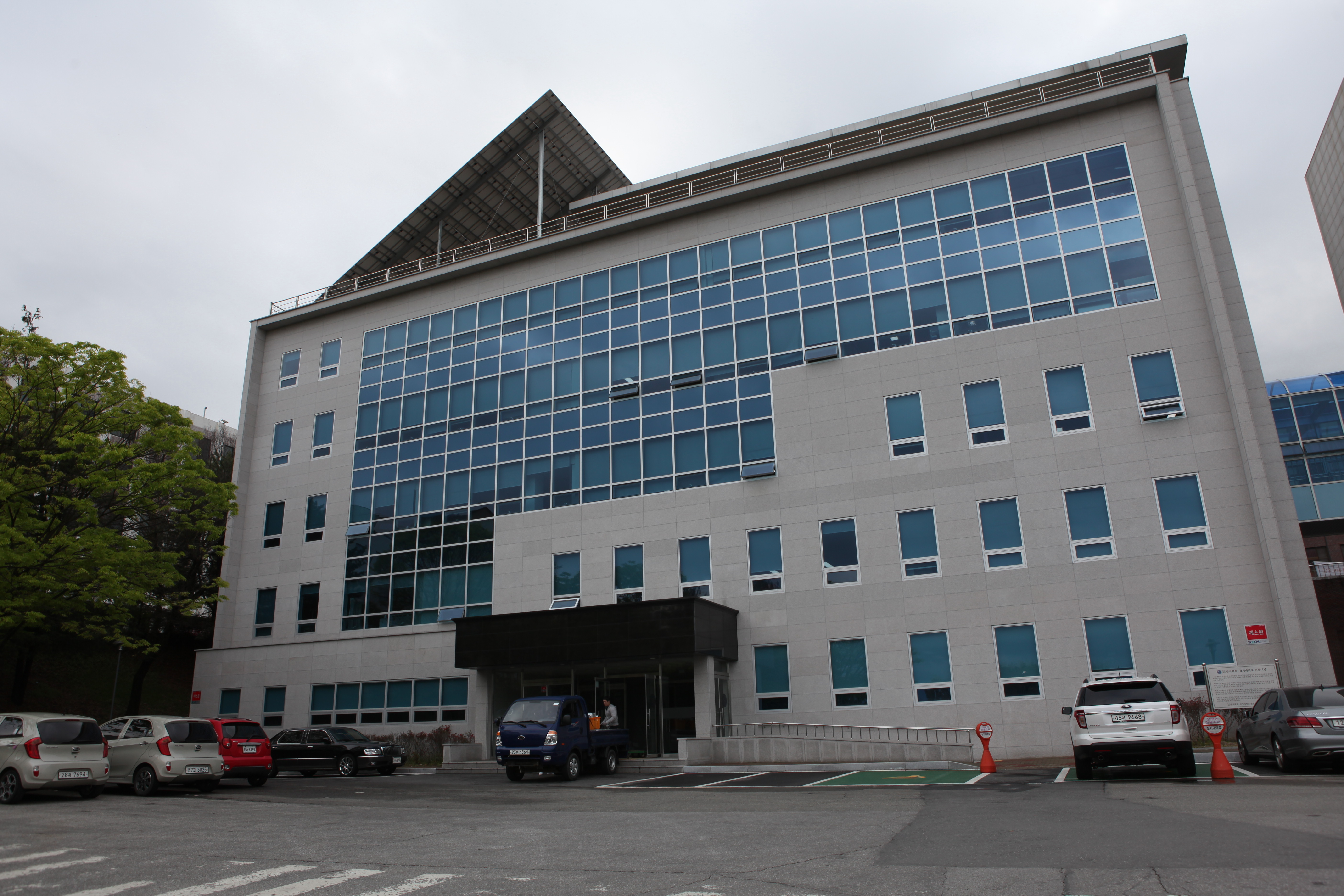 상지대 교육행정복합동